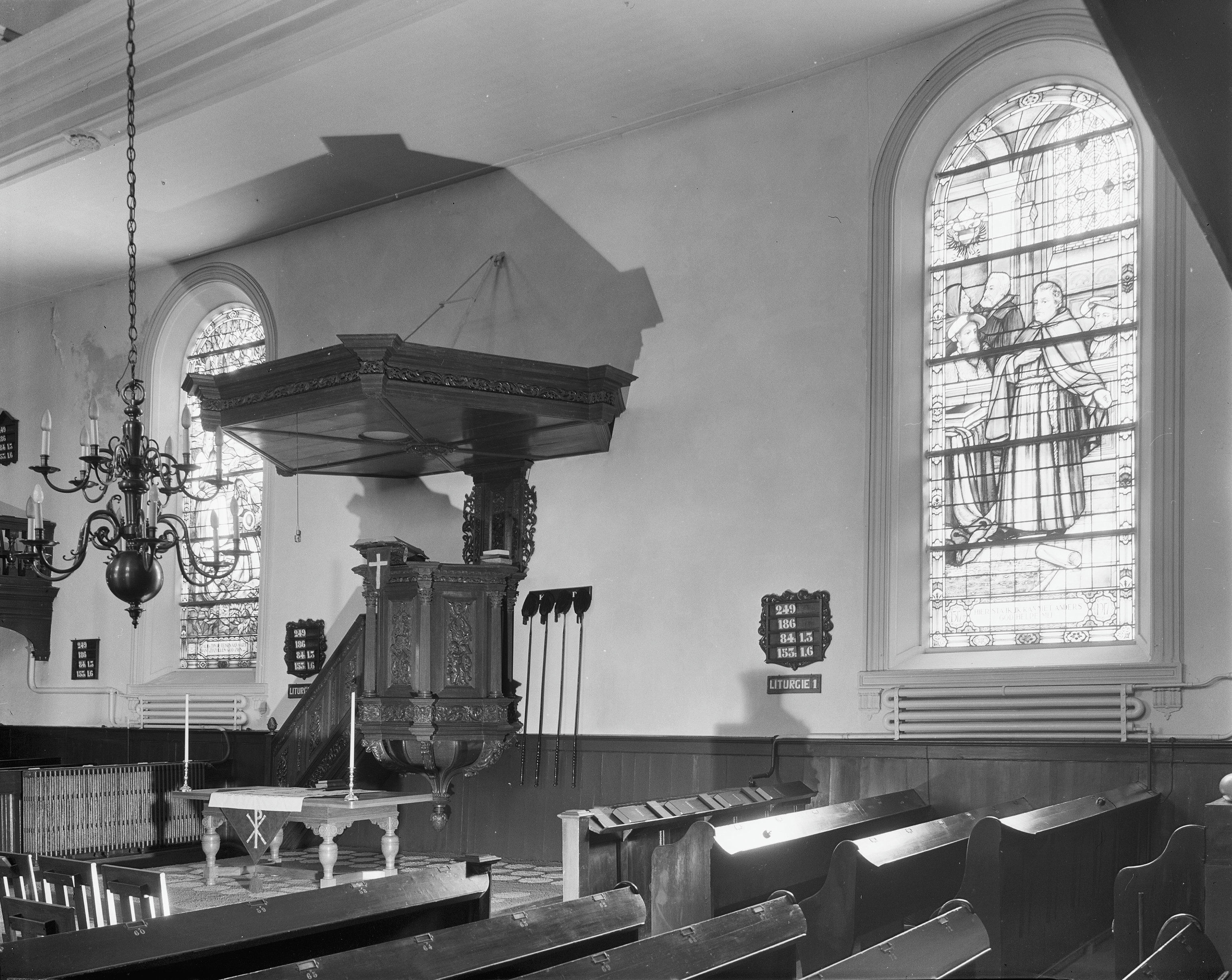 Lutherse Kerk, Groningen, interieur, 1967